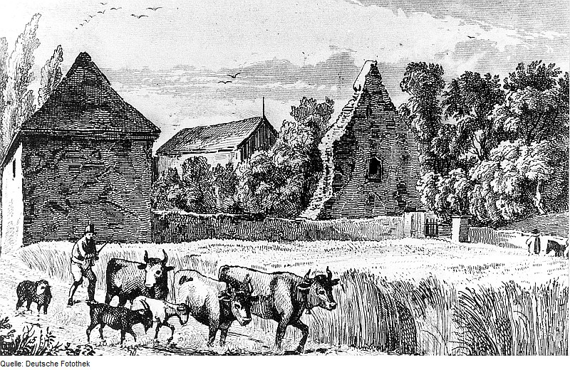 Original image description from the Deutsche Fotothek Grimma-Nimbschen. Kloster Nimbschen, aus: Schiffner 1840